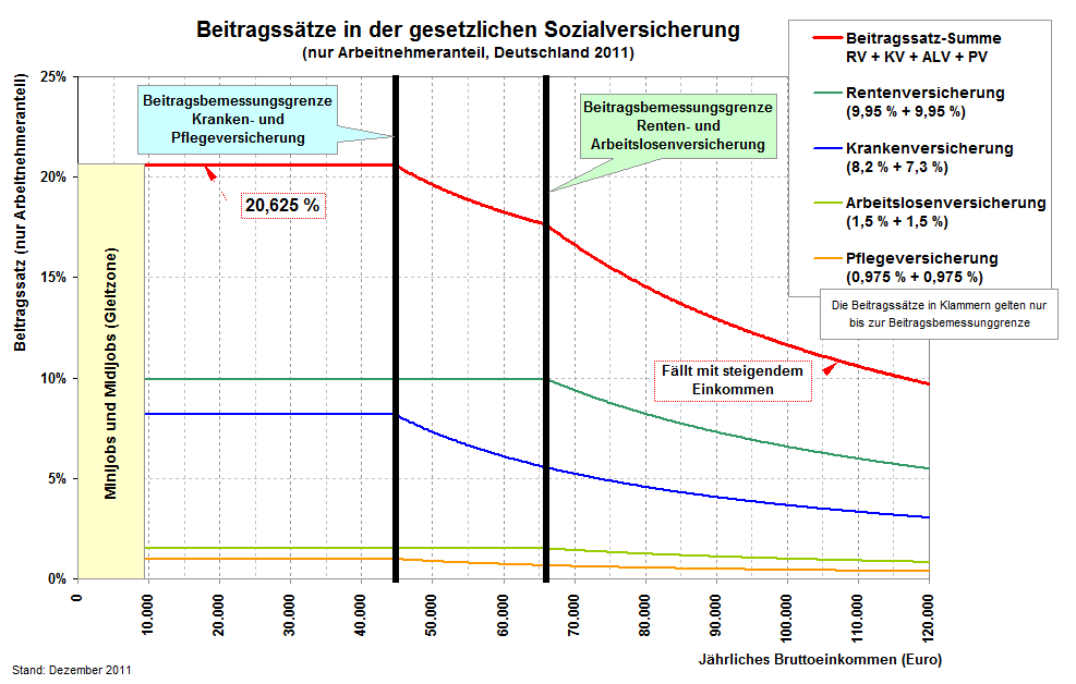 Die Grafik zeigt den Verlauf des effektiven Beitragssatzes in der gesetzlichen Sozialversicherung Deutschland im Jahr 2011. Über den Beitragsbemessungsgrenzen liegende Einkommensteile sind nicht mehr beitragspflichtig - der Beitrag in Euro bleibt dann unabhängig von der Einkommenshöhe konstant. Durch die Art der Berechnung des effektiven Beitragssatzes in Prozent (Beitrag geteilt durch Bruttoeinkommen) ist dessen Verlauf fallend (degressiver Tarif).